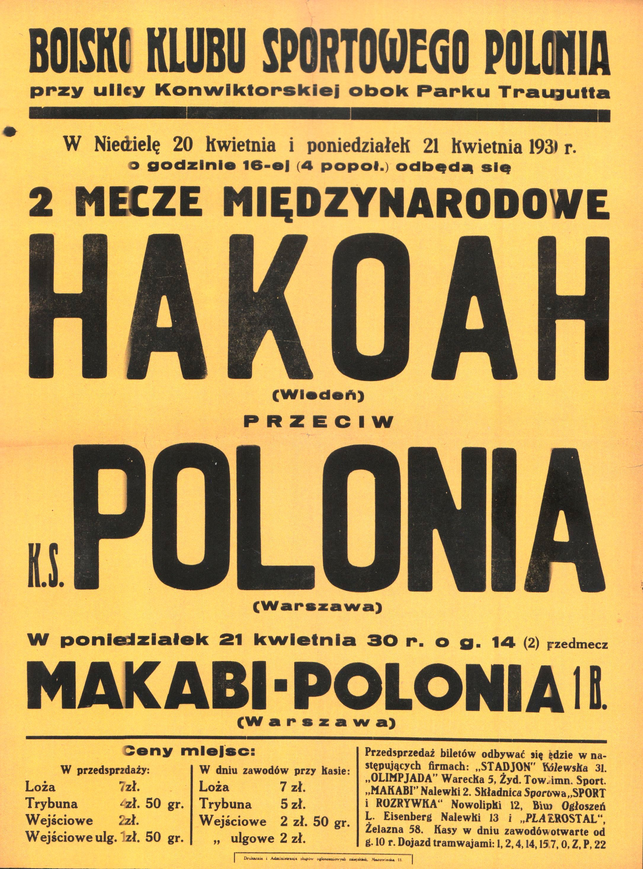 Plakat zapowiadający mecz piłki nożnej Hakoah Wiedeń i Polonii Warszawa na Stadionie Polonii w dniach 20 i 21 kwietnia 1930